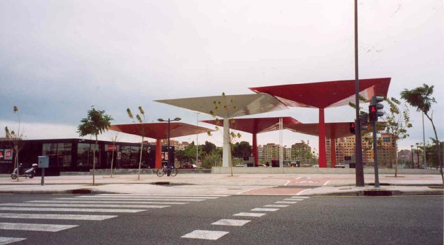 Estación de servicio Repsol (tipo Foster) en Maestro Rodrigo (Valencia). Construida en 2002.